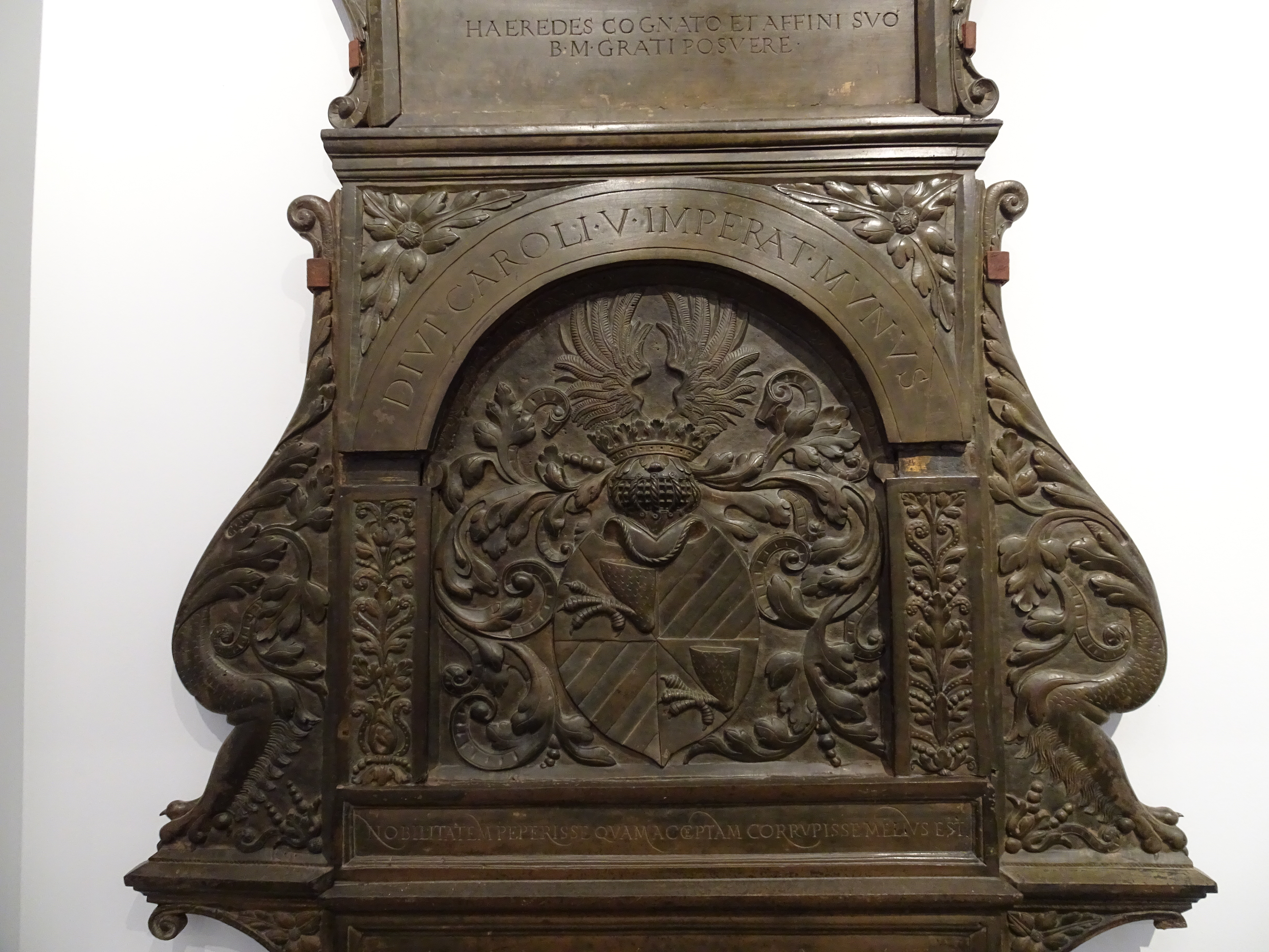 Detail des Epitaphs für Christoph "Türk" von Kruschwitz in der Universitätskirche St. Pauli zu Leipzig